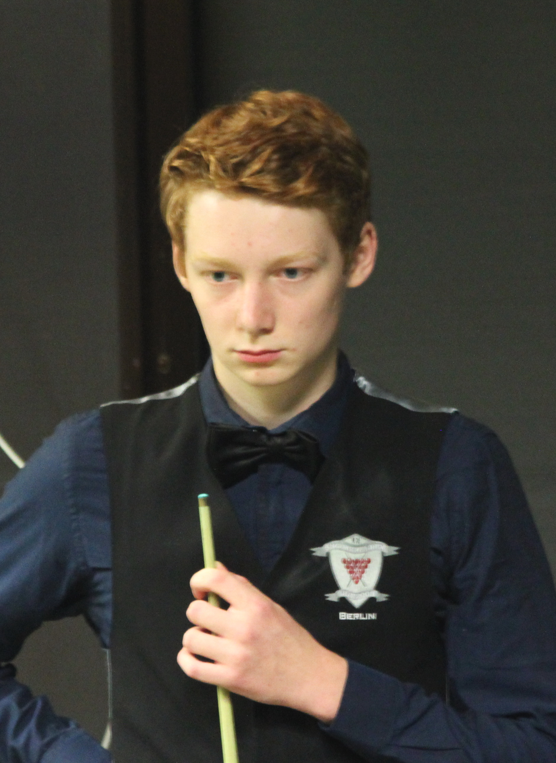 Simon Lichtenberg beim Paul Hunter Classic 2016